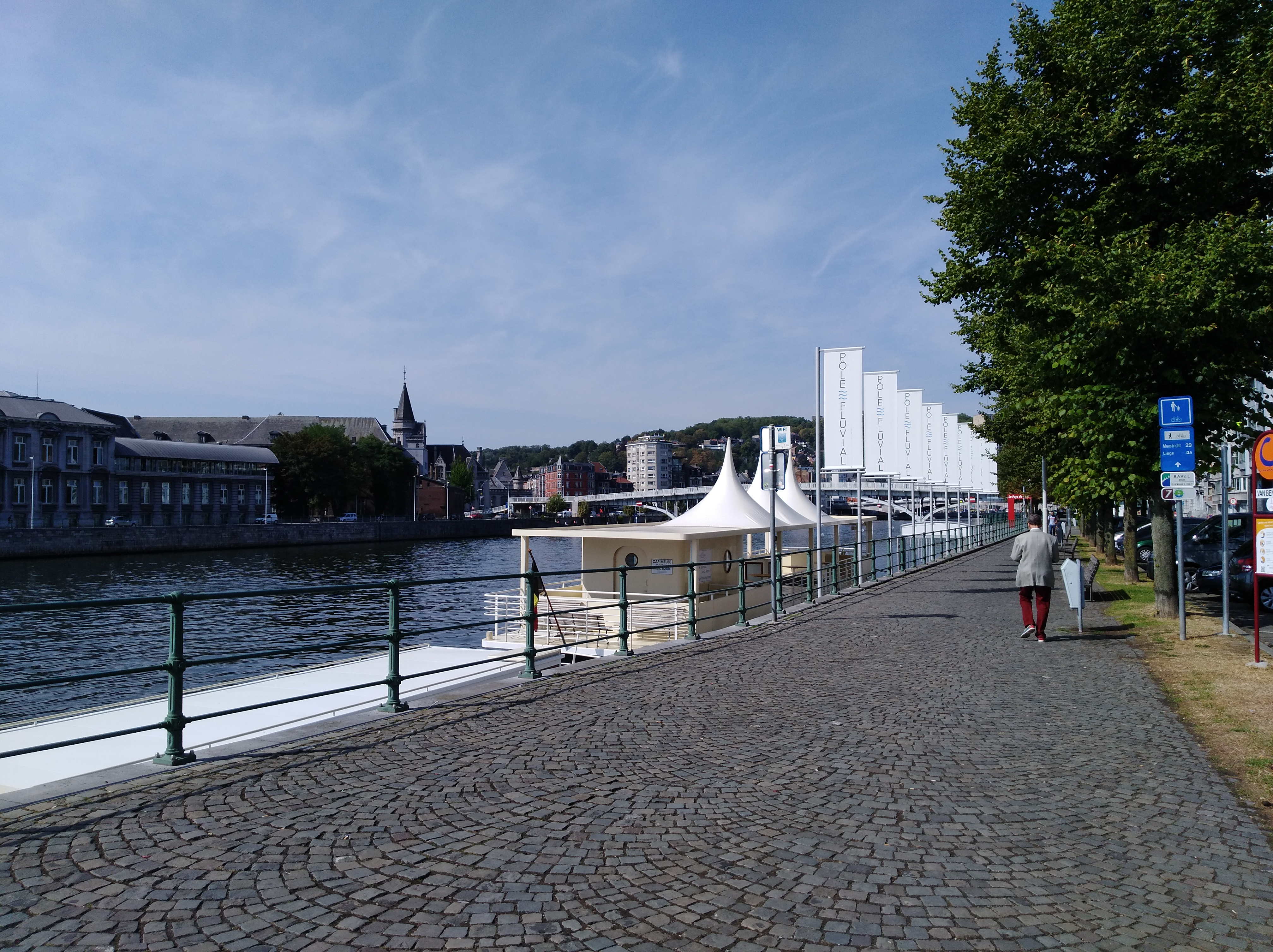 Le pôle fluvial quai Van Beneden en août 2018